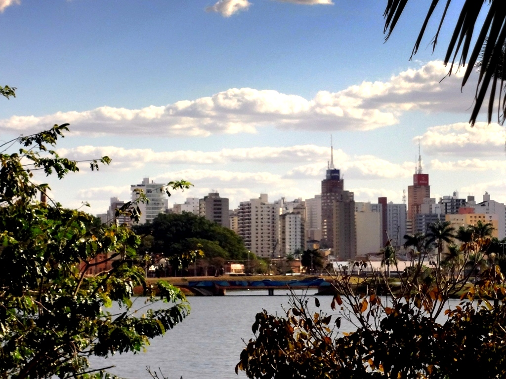 Vista do Centro de São José do Rio Preto, SP